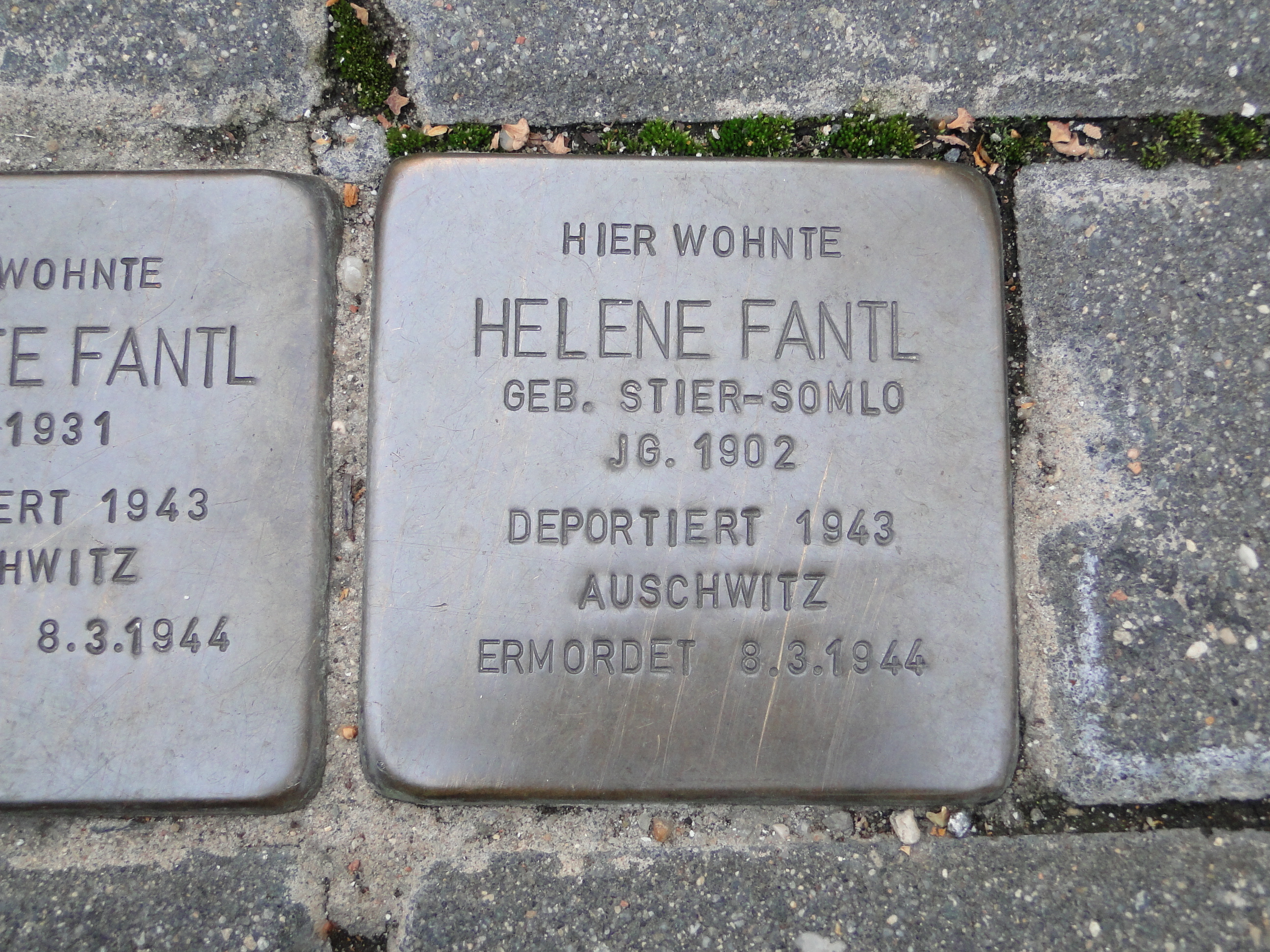 Stolperstein für Helene Fantl in Dresden